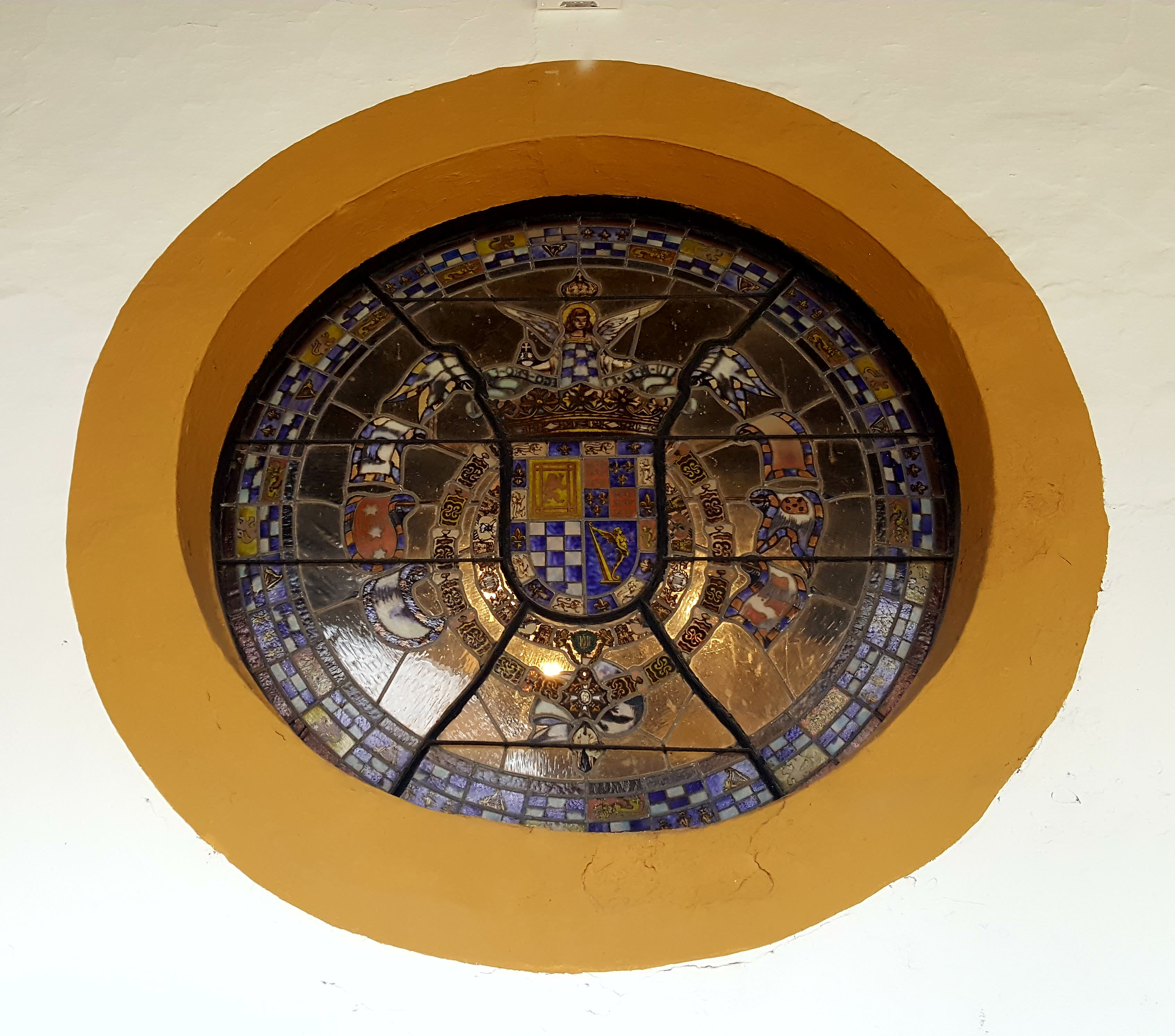 Vidriera en ojo de buey con el escudo de la Casa de Alba. Palacio de las Dueñas, Sevilla.